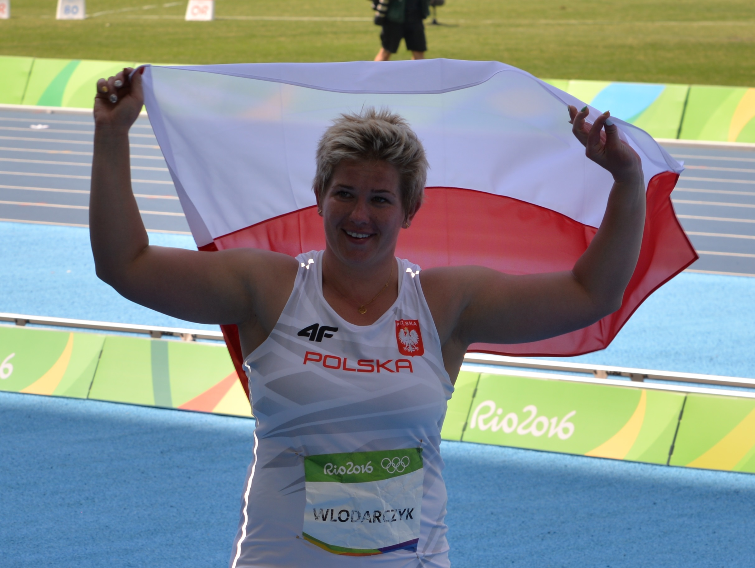 Anita Włodarczyk défilant après sa victoire au concours du lancer de marteau aux JO de Rio 2016